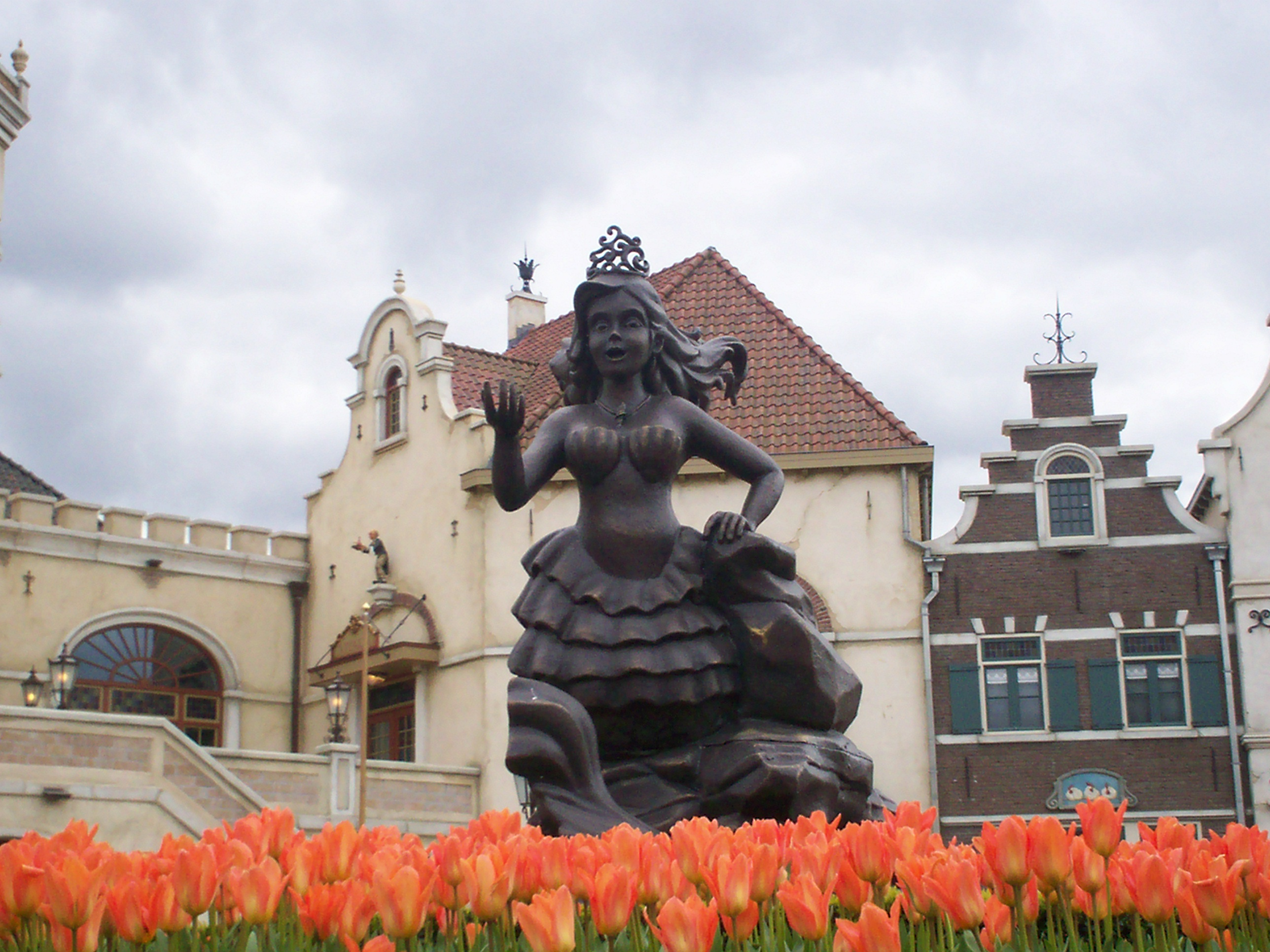 Vroegere beeld voor theater